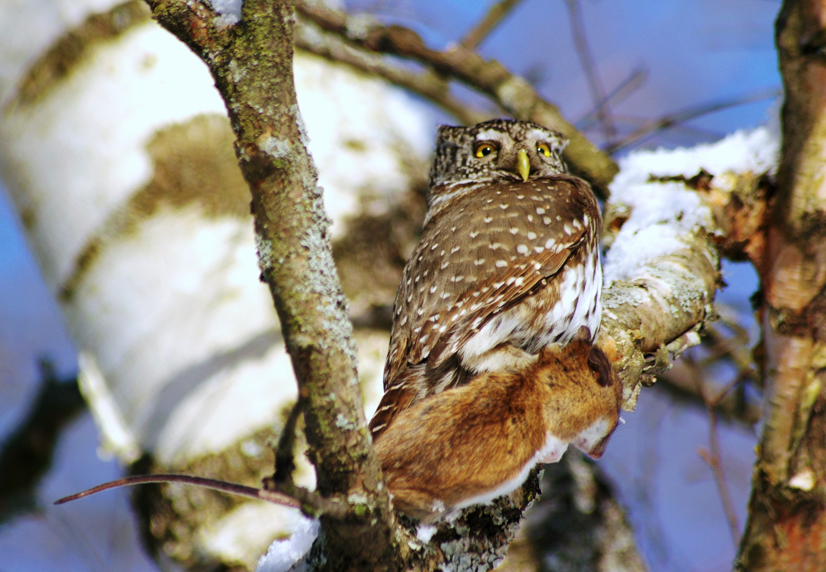 Värbkakk saagiga Glaucidium passerinum